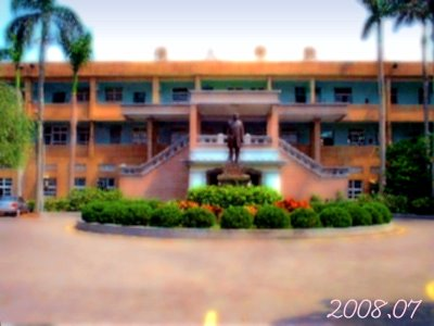 臺灣省桃園縣龍潭鄉龍潭農工。